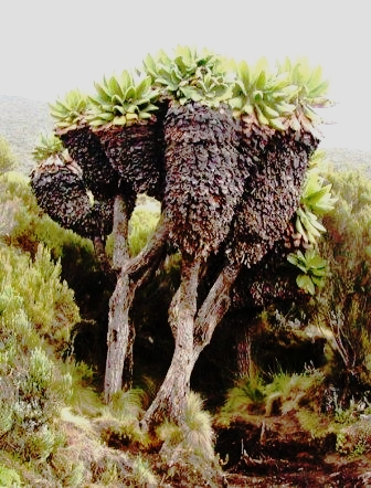 Dendrosenecio kilimanjari - Kilimanjaro National Park - Tanzania